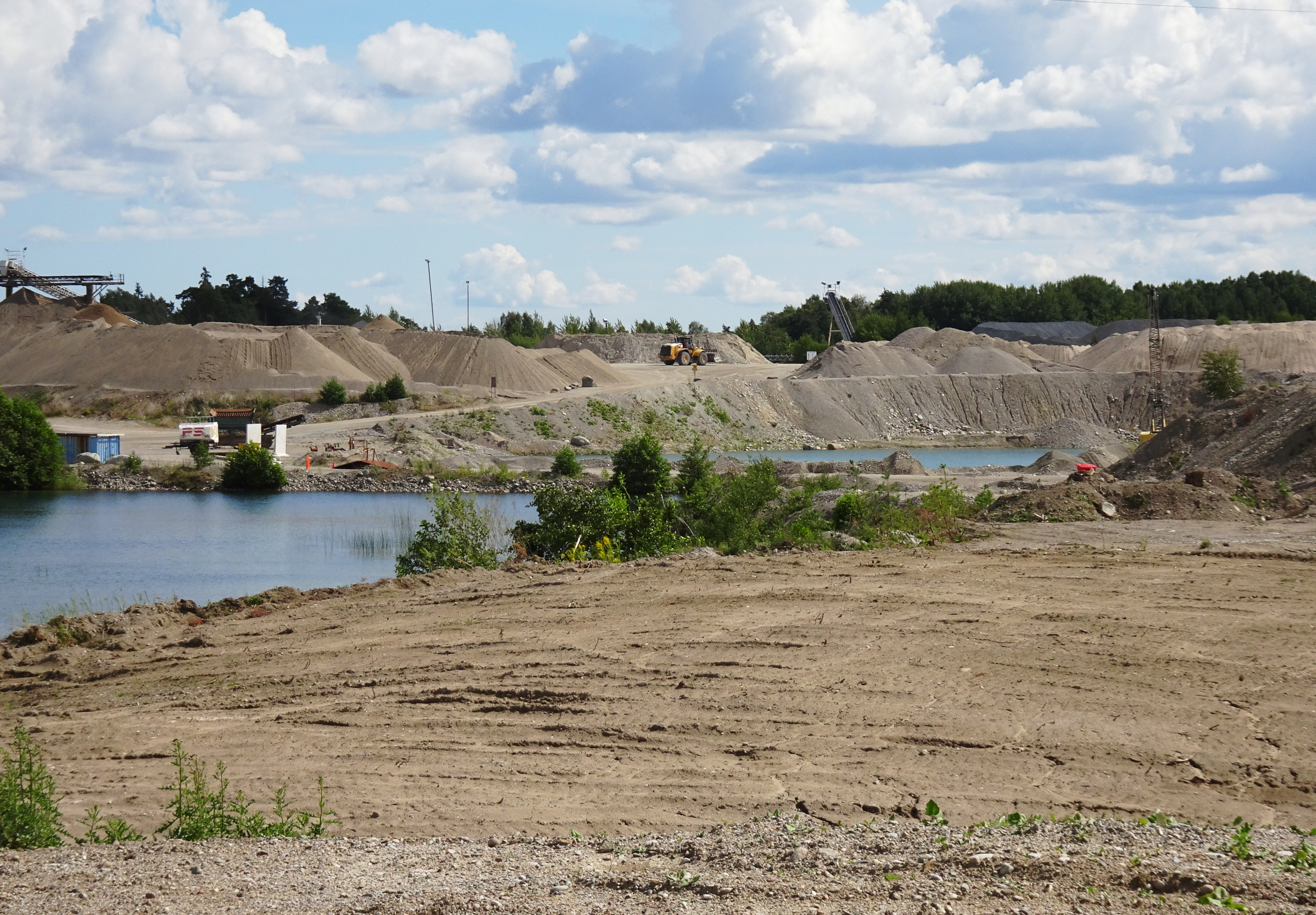 Lötens grustäkt på Musön, Ekerö kommun